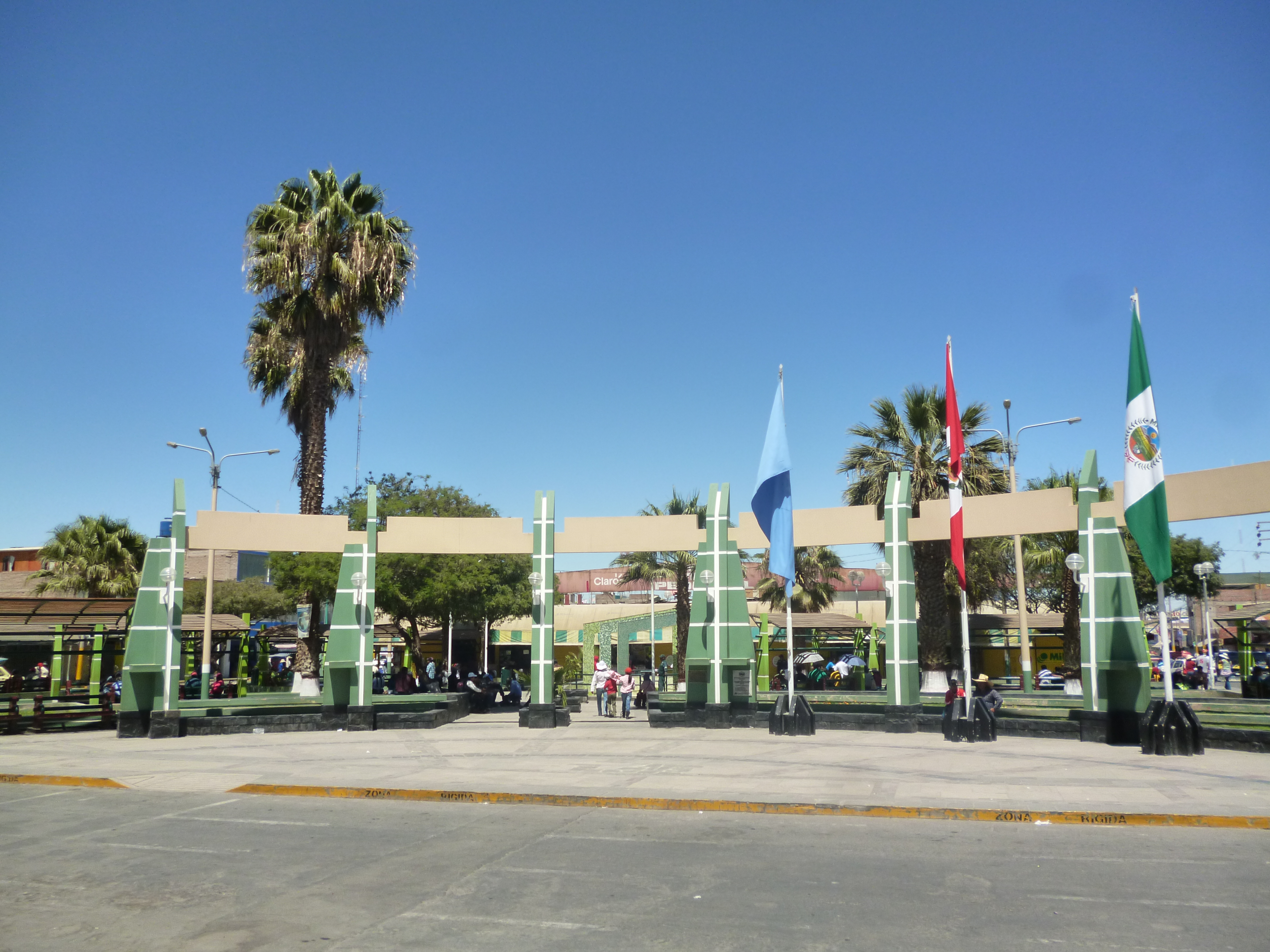 Vista de la Plaza de Armas de El Pedregal, capital del distrito de Majes.